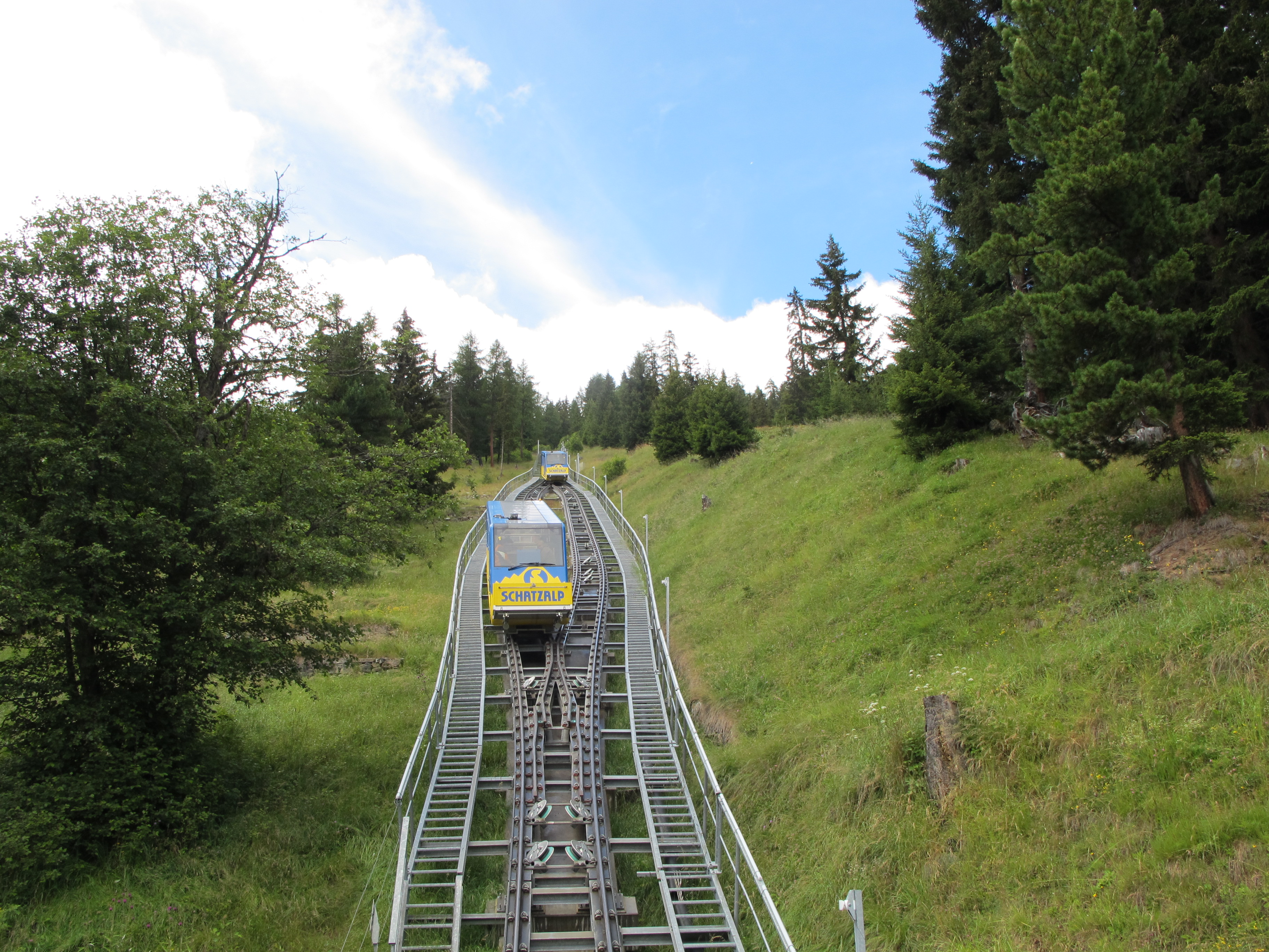 Schatzalpbahn Davos